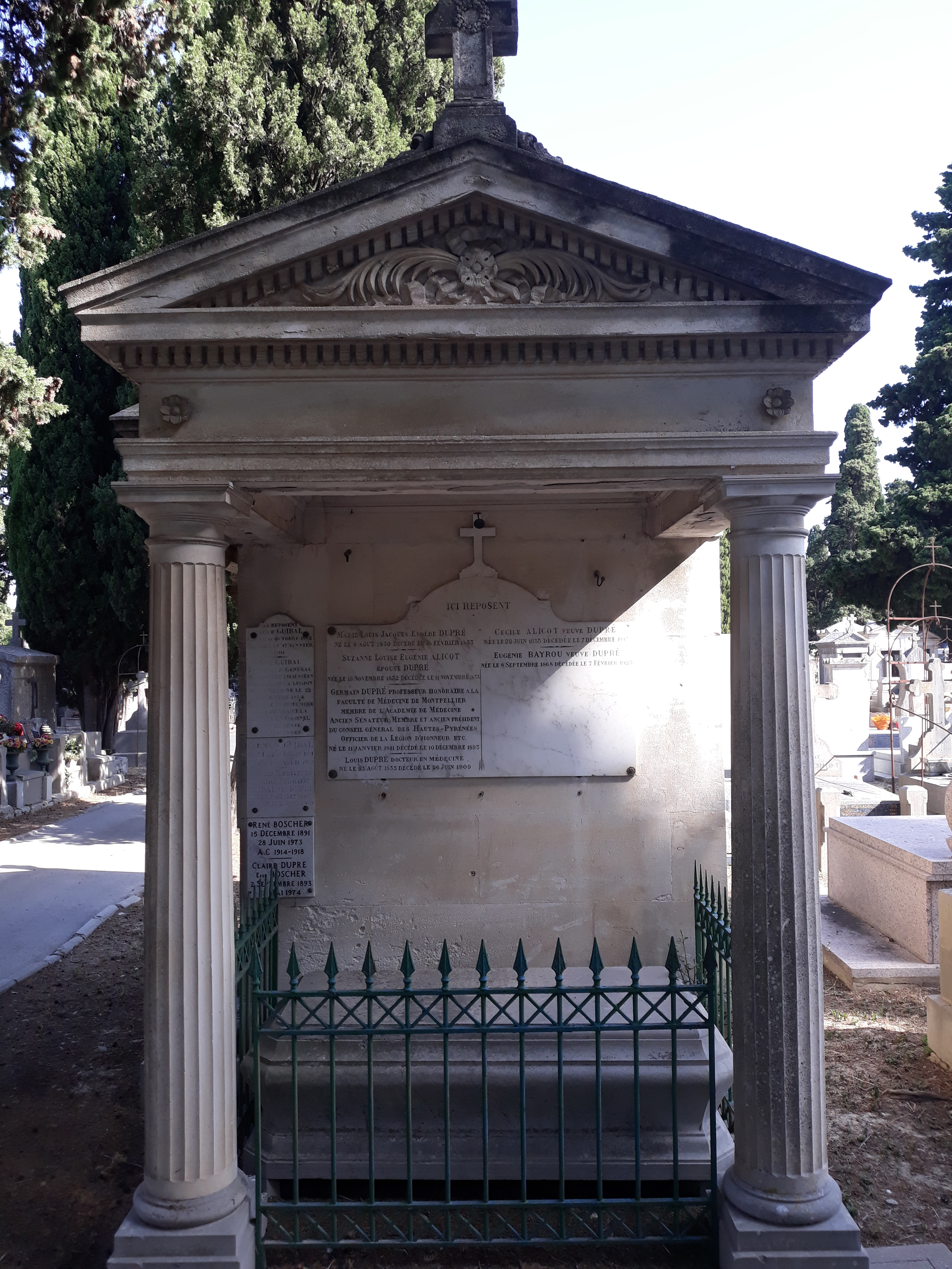 Das Grab des französischen Arztes und Politikers Germain Dupré auf dem Cimetière Saint-Lazare in Montpellier.